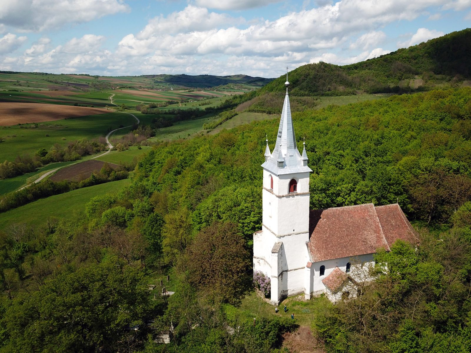 A berekeresztúri református templom